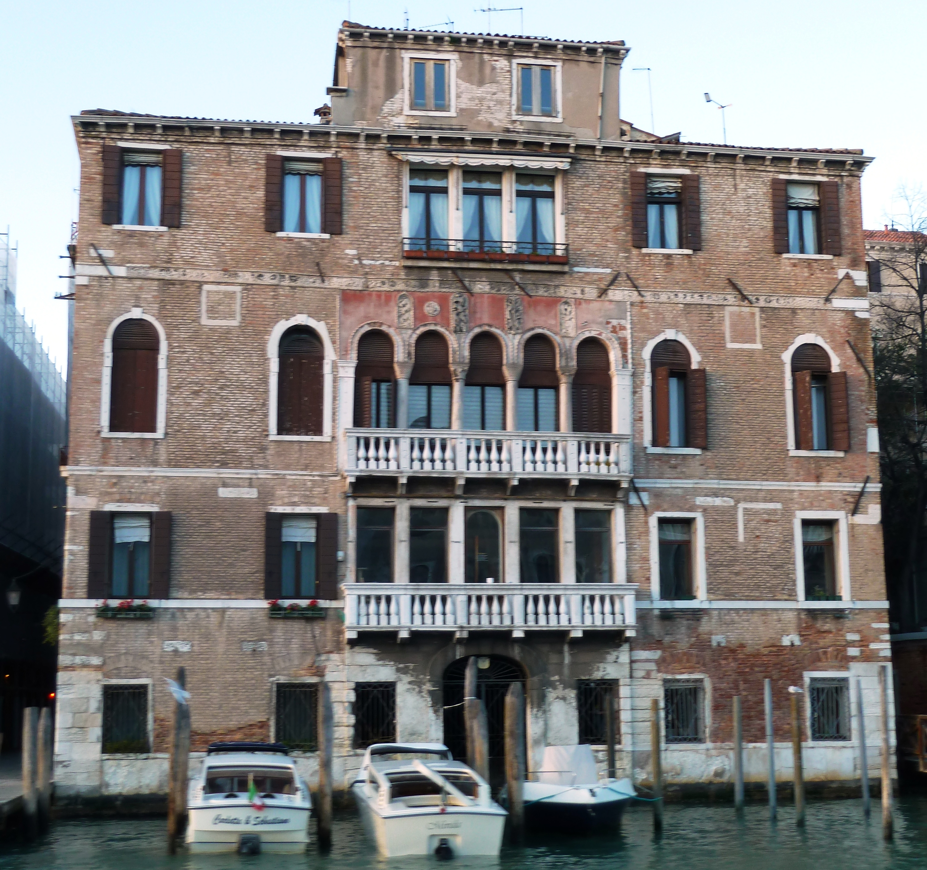 Pal dona della trezza gran canal